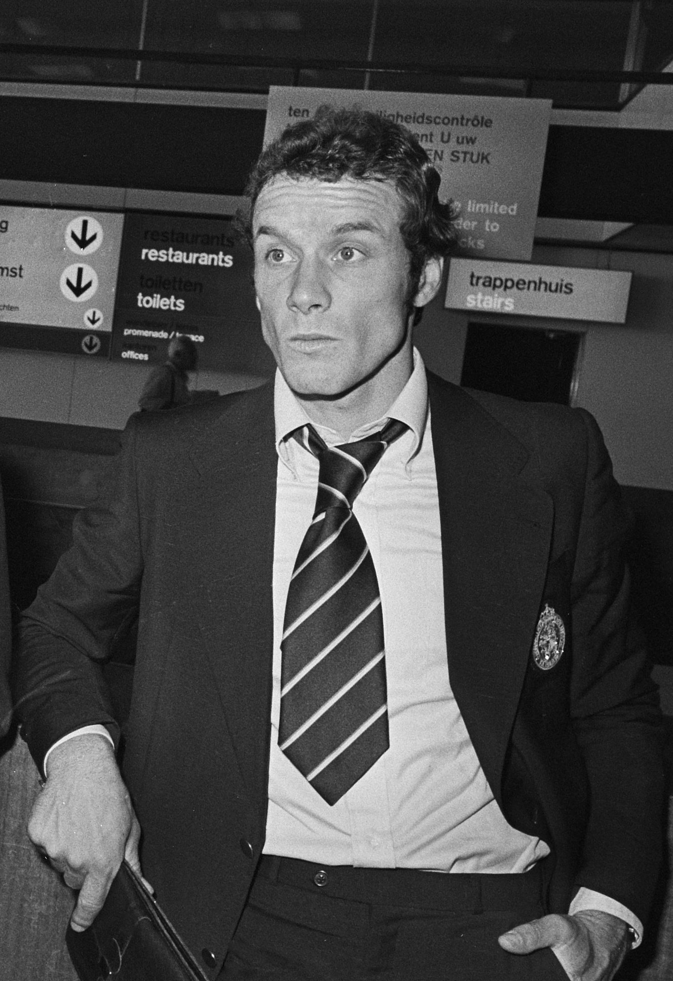 Nederlands Elftal vanaf Schiphol naar Island; Willy van de Kerkhof.